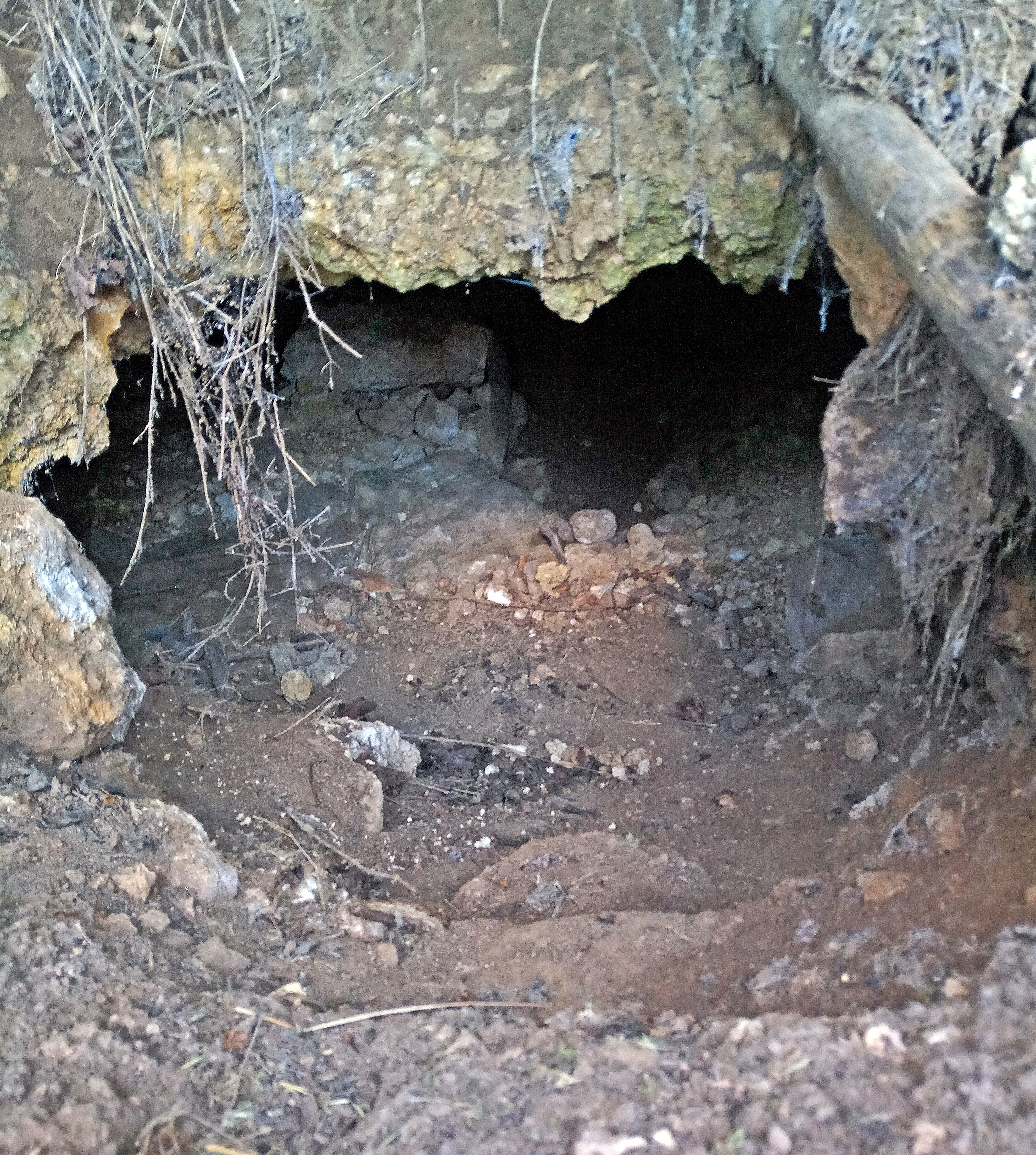 Felsenberg Herxheim, Eingang zur Karsthöhle